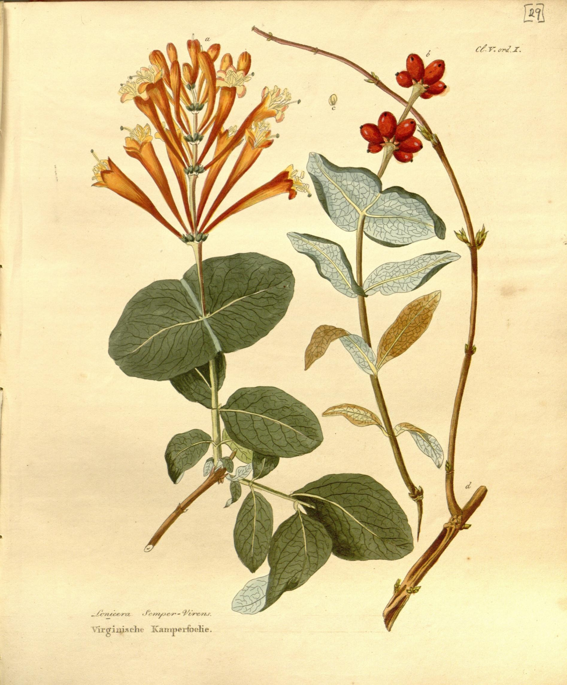 \ 4 I I CcJ'^or^^.T, tfe/^^^./^^^ ' '7 c^e^?zj'. l/lrQ'iiii.Hclie Kamperfoelie